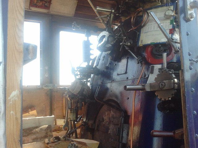 Будка управления паровозом